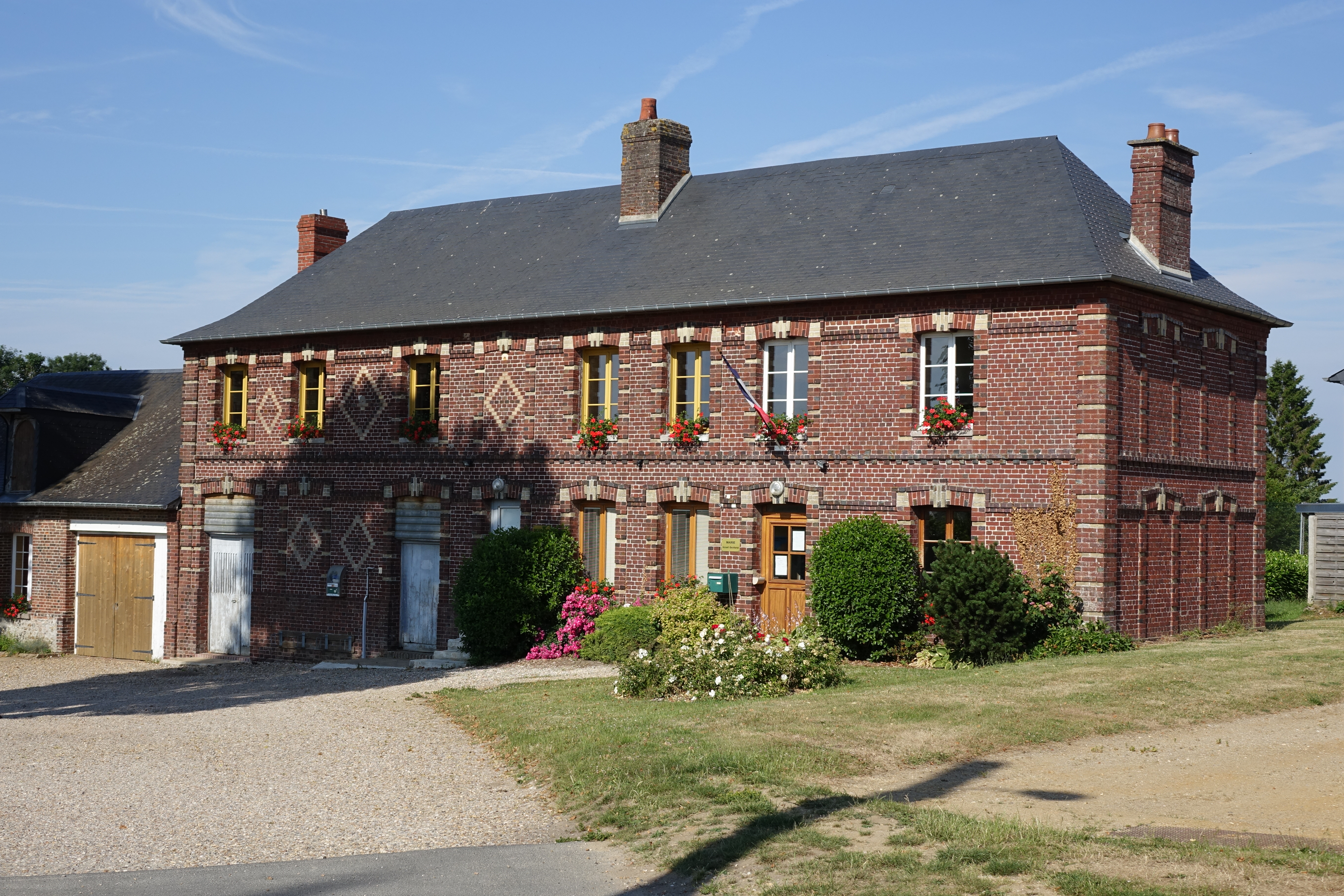 Mairie d'Auzouville-sur-Ry, Seine-Maritime, France